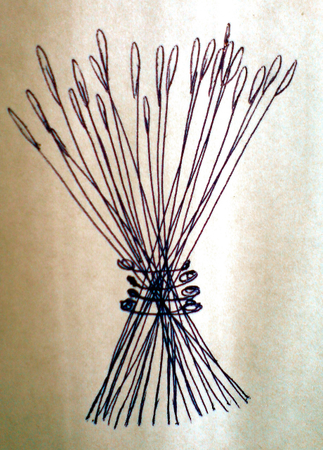 Karrikoitu kuva Lyhteestä